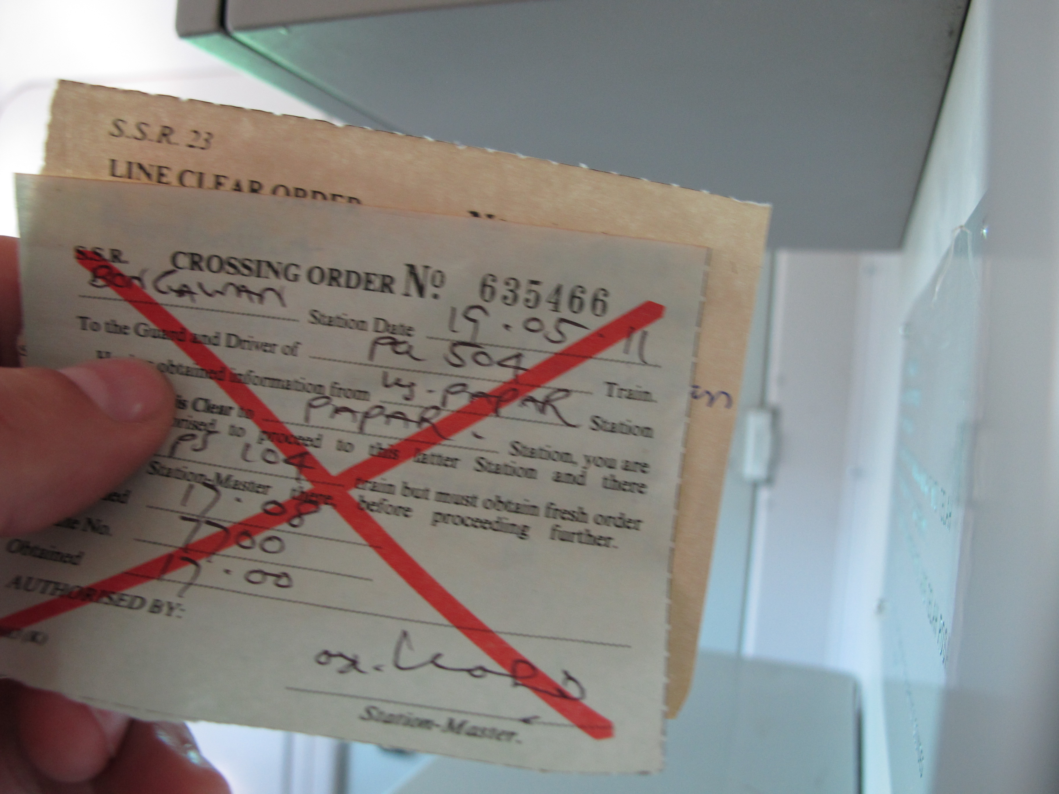 Erlaubnisschein für den Zugführer der Sabah State Railway, den nächsten Streckenabschnitt zu durchqueren.